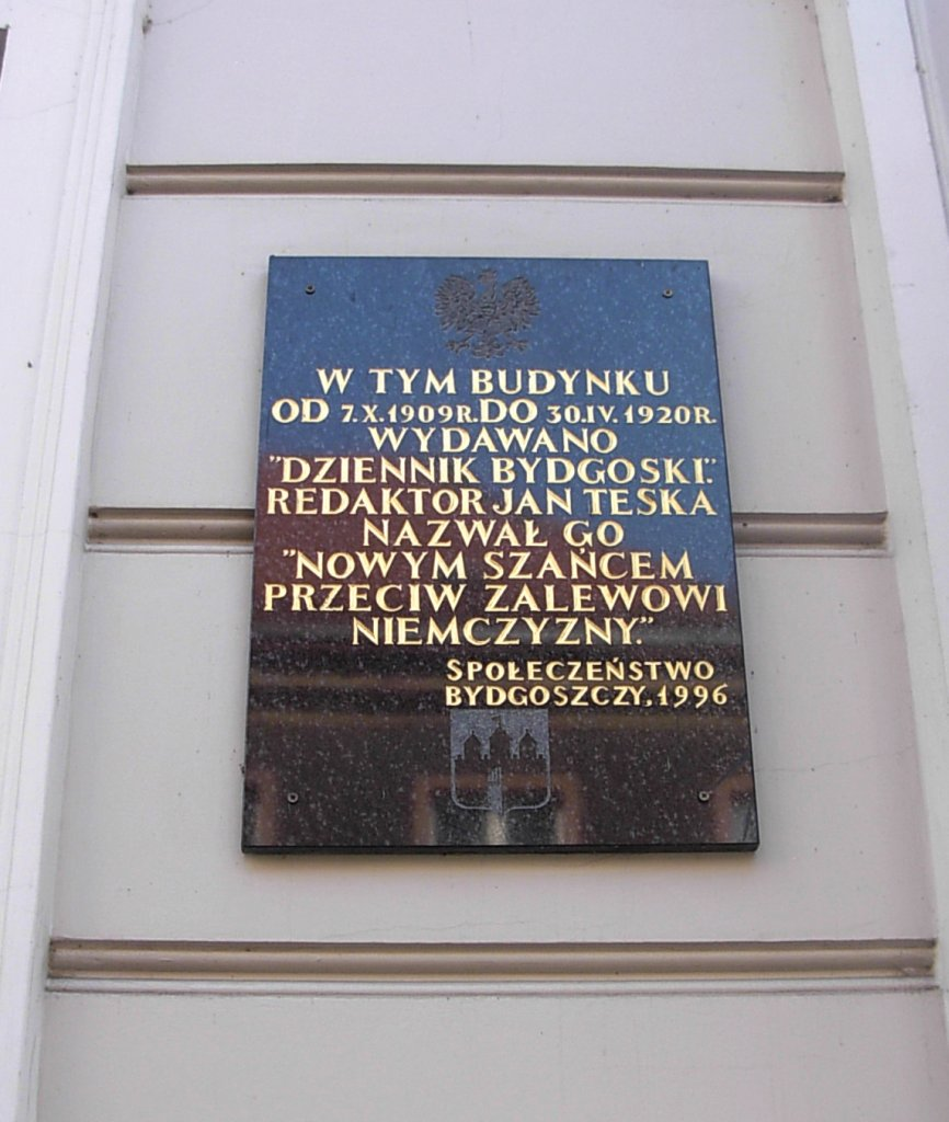 Tablica pamiątkowa Jana Teski na fasadzie kamienicy Długa 52 w Bydgoszczy, róg ul. Jana Kazimierza